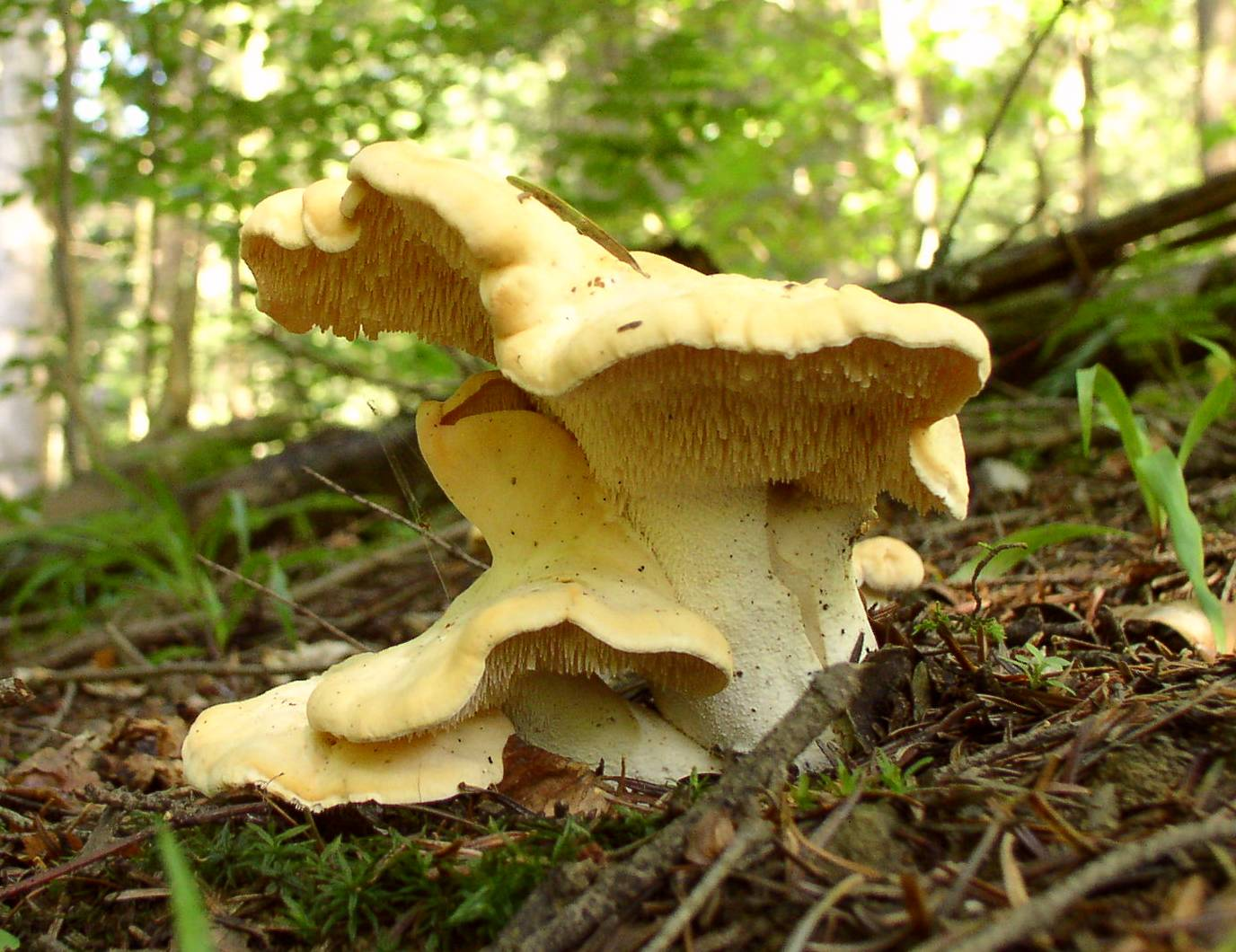 Hydnum repandum w okolicach Krecowa (gm. Tyrawa Wołoska). 30 sierpnia 2005r.